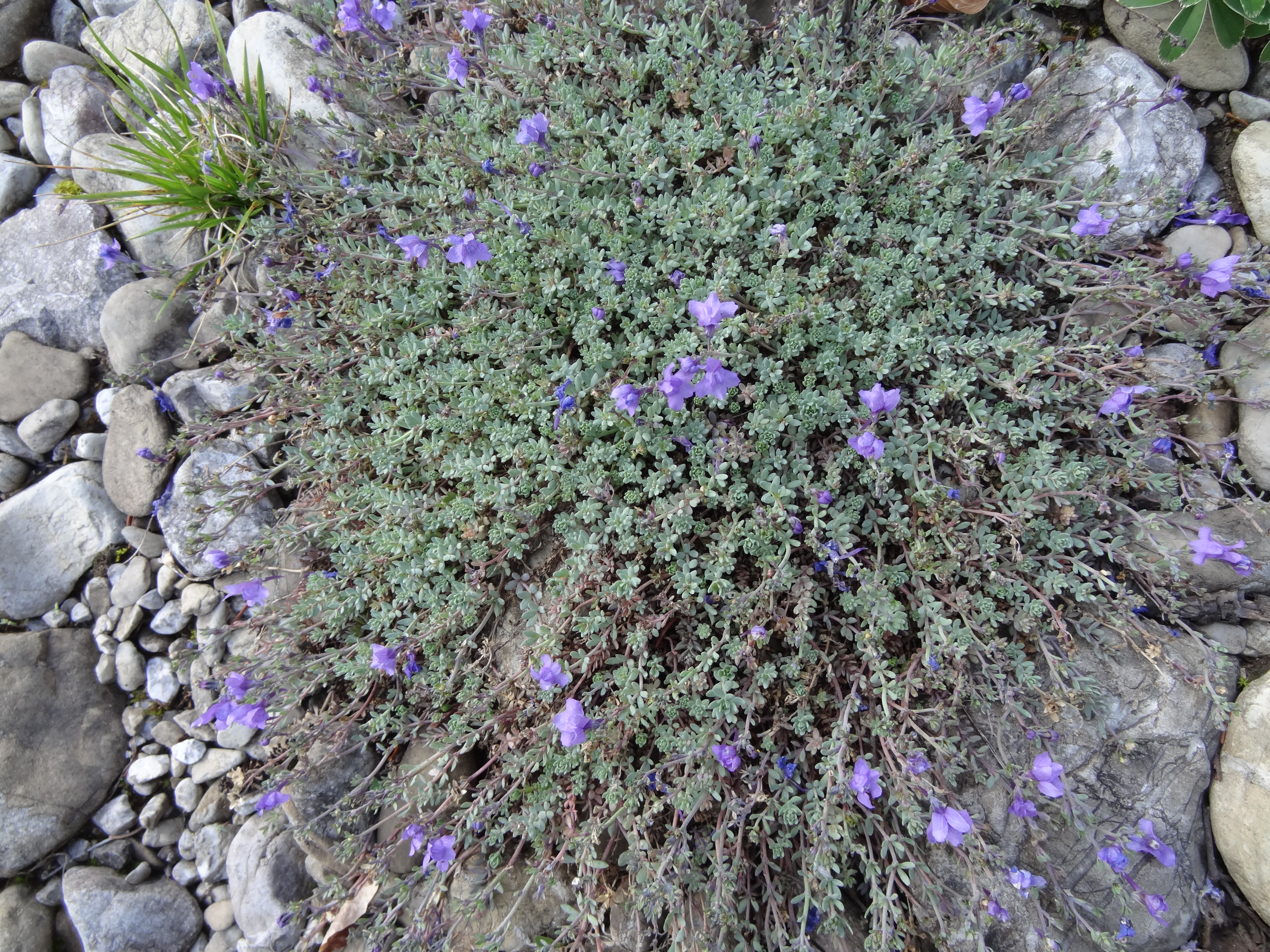 Scrophulariaceae, Alpen-Leinkraut Deutschland, Bayern, Allgäu, Oberstdorf, Stillachtal, 900 m Photo: U.Schmidt, 23.VI.2012